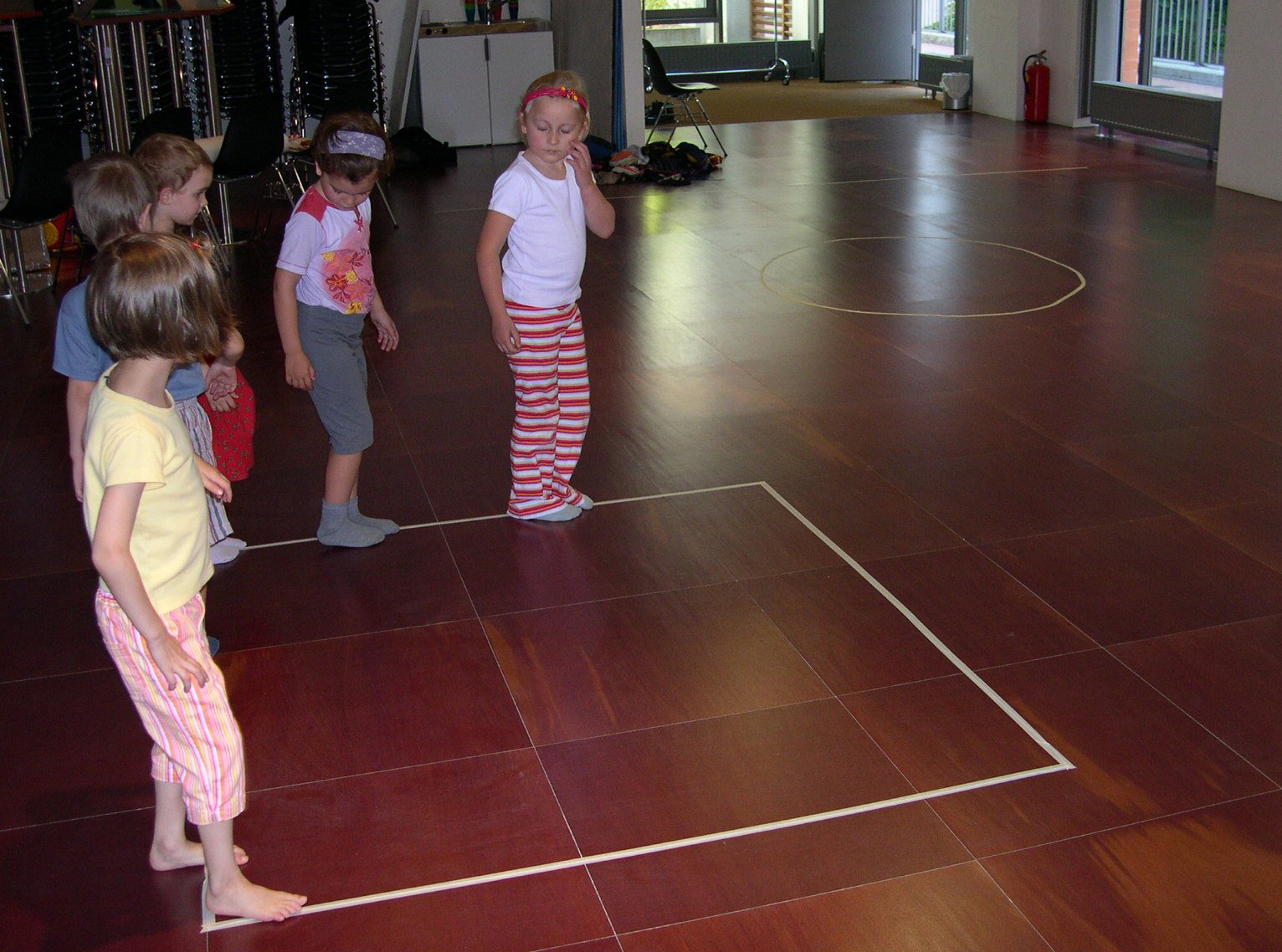 Kurs für 5jährige Kinder Wir spielen uns durch die Mathematik im math.space im Wiener MuseumsQuartier. Ergehen geometrischer Figuren, hier Quadrat.